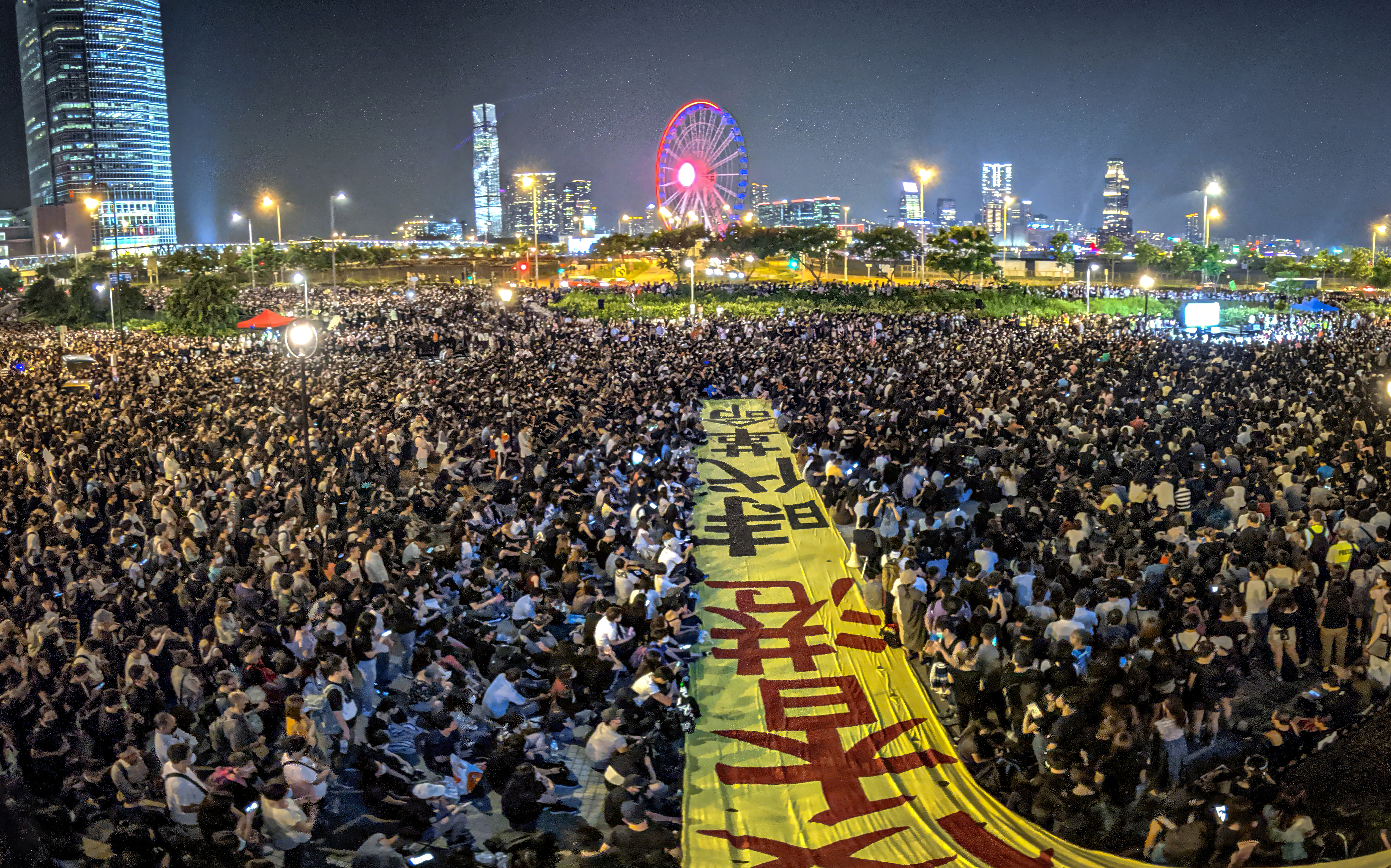 20190927 Central